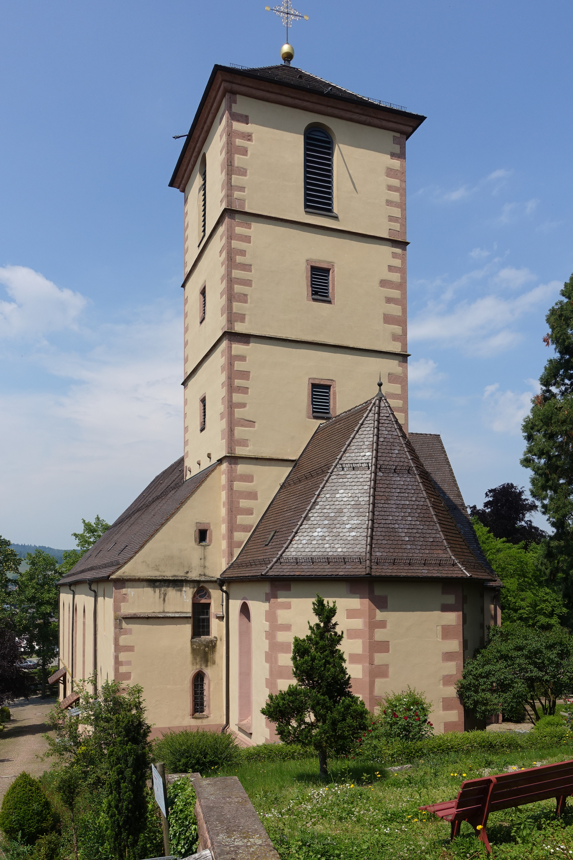 Kirche St. Martin in Gengenbach